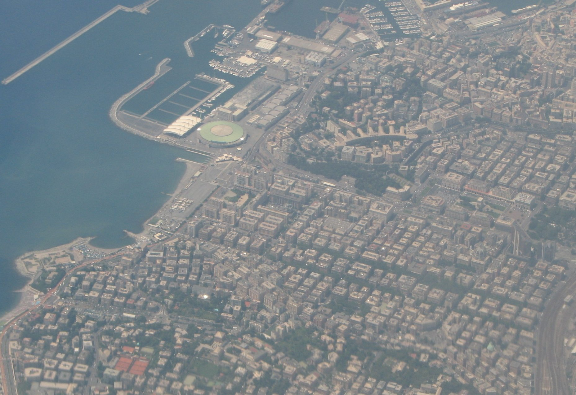 Il quartiere genovese della Foce visto dall'aereo, stretto fra i quartieri di Albaro e Carignano, rispettivamente a Est (in basso nella foto) e a Ovest (in alto)